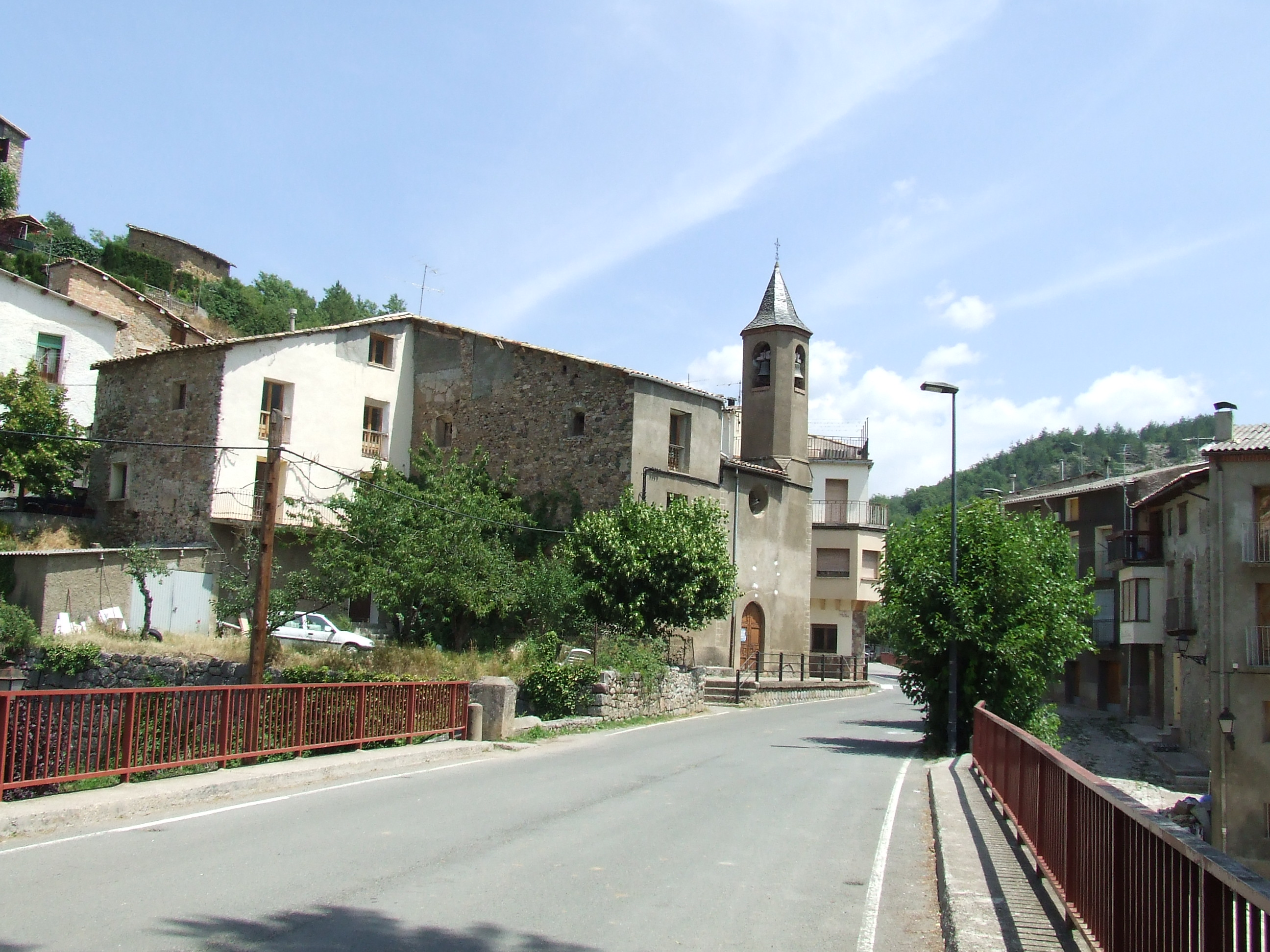 Senterada (Pallars Jussà)